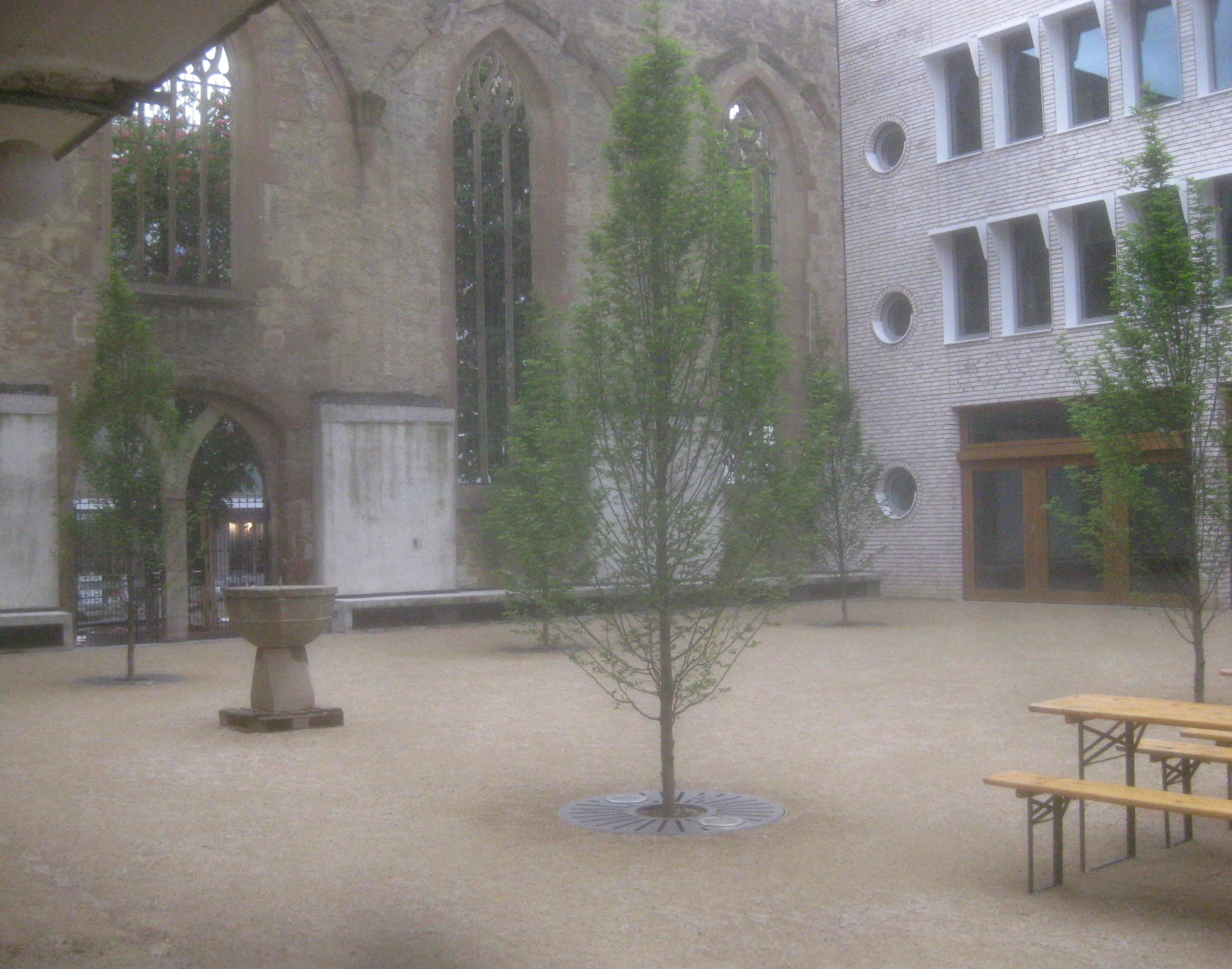 Hospitalhof Stuttgart, südlicher Innenhof mit Taufbecken.Links: Hospitalkirche. Hinten: Verbliebene Südfassade der Hospitalkirche.